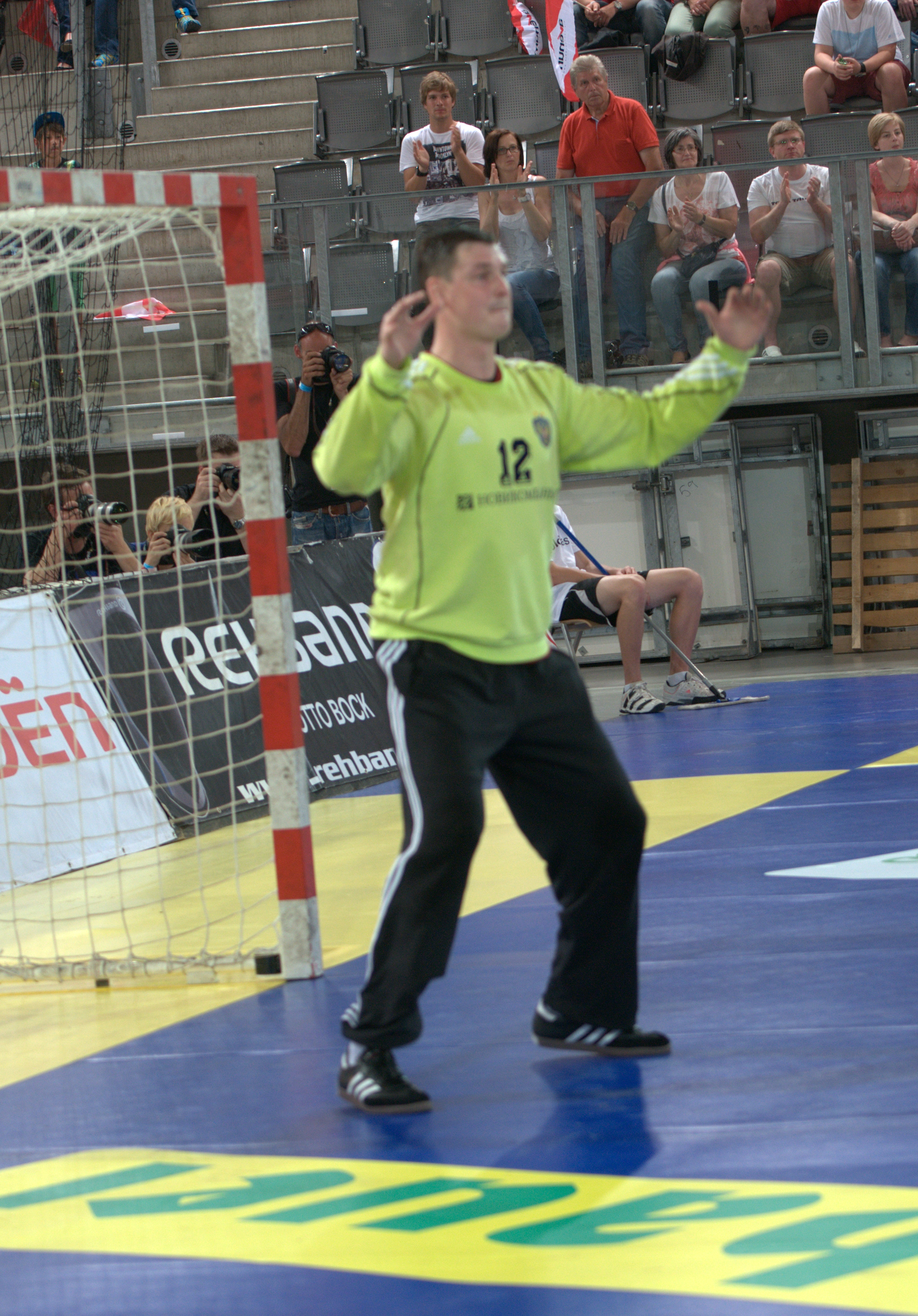 Handball EM Qualifikationspiel Österreich vs. RusslandWadim Andrejewitsch Bogdanow, Russlands Goalie